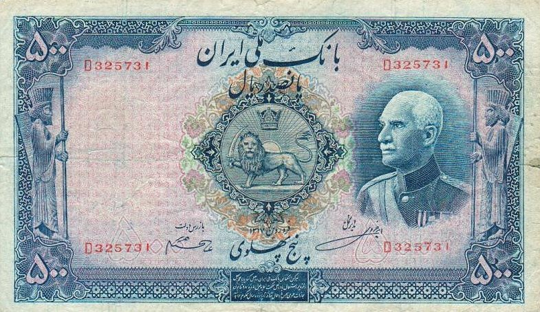 500 иранских риалов. 1938. Аверс. Пехлеви I-й и герб Ирана